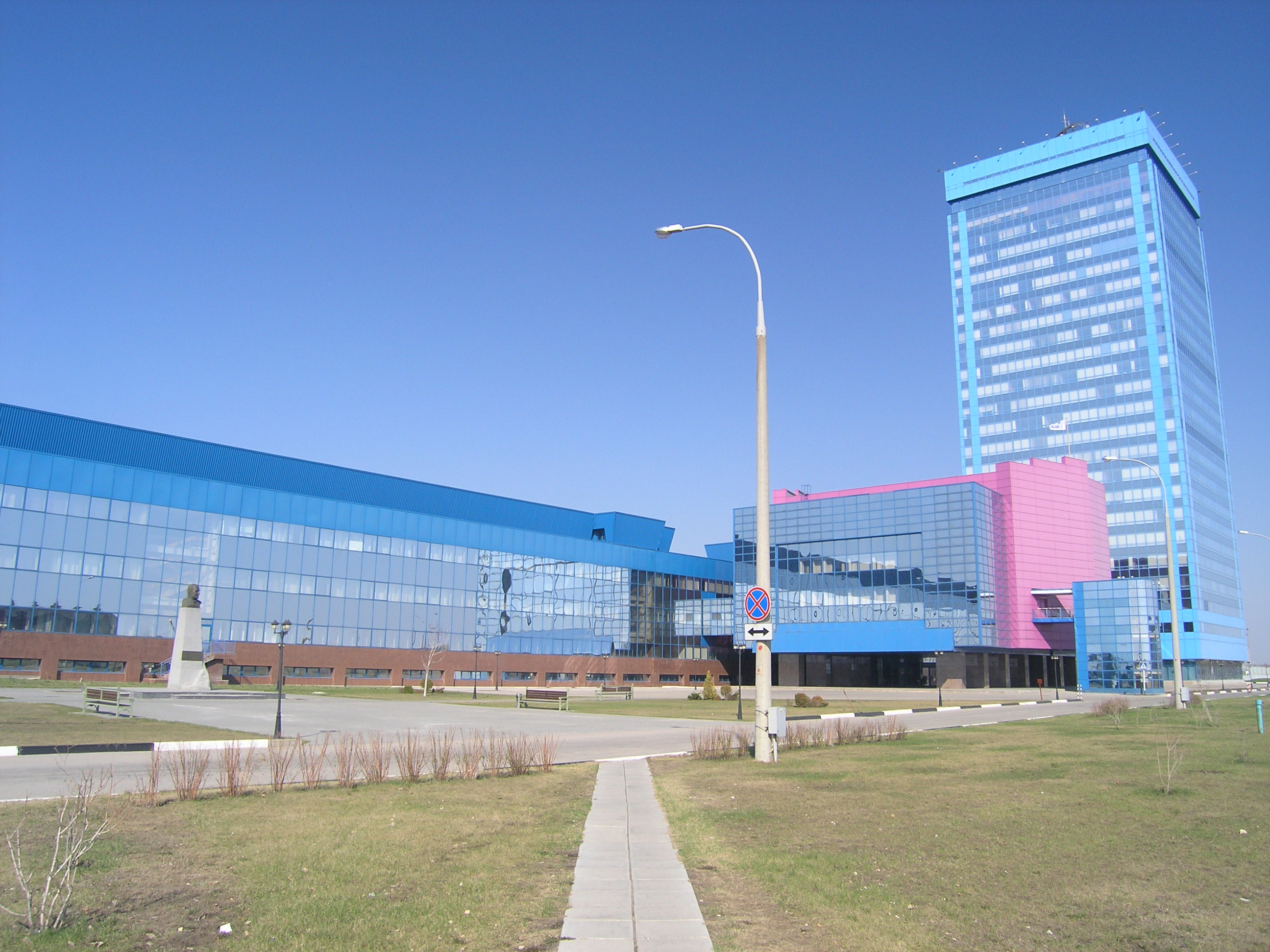 Заводоуправление АО "АВТОВАЗ"